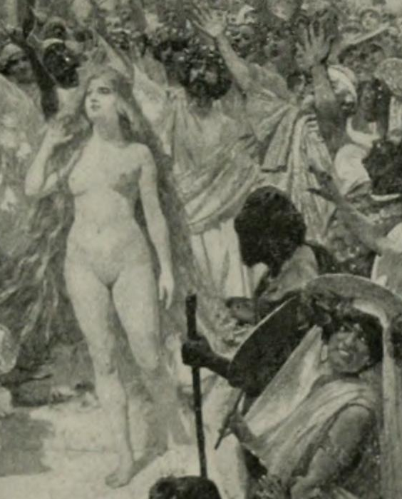 Phryne aux fêtes de Vénus (détail)